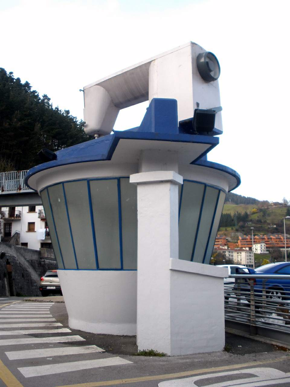 Fábrica de máquinas de coser Sigma, en Elgoibar (Gipuzkoa)